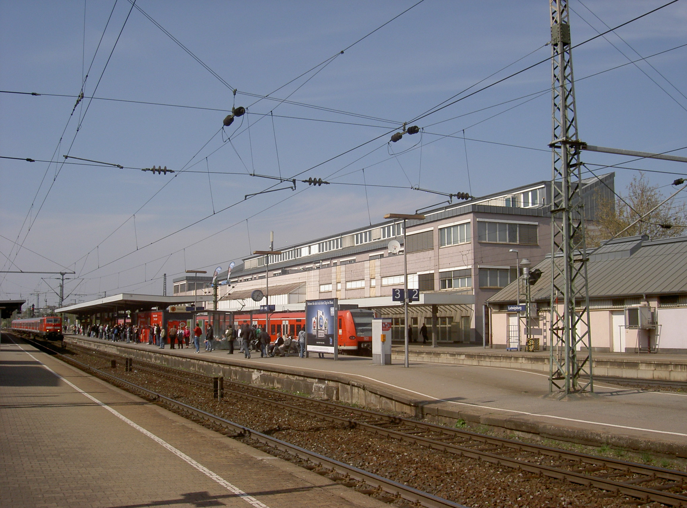 Bahnhof Ludwigsburg